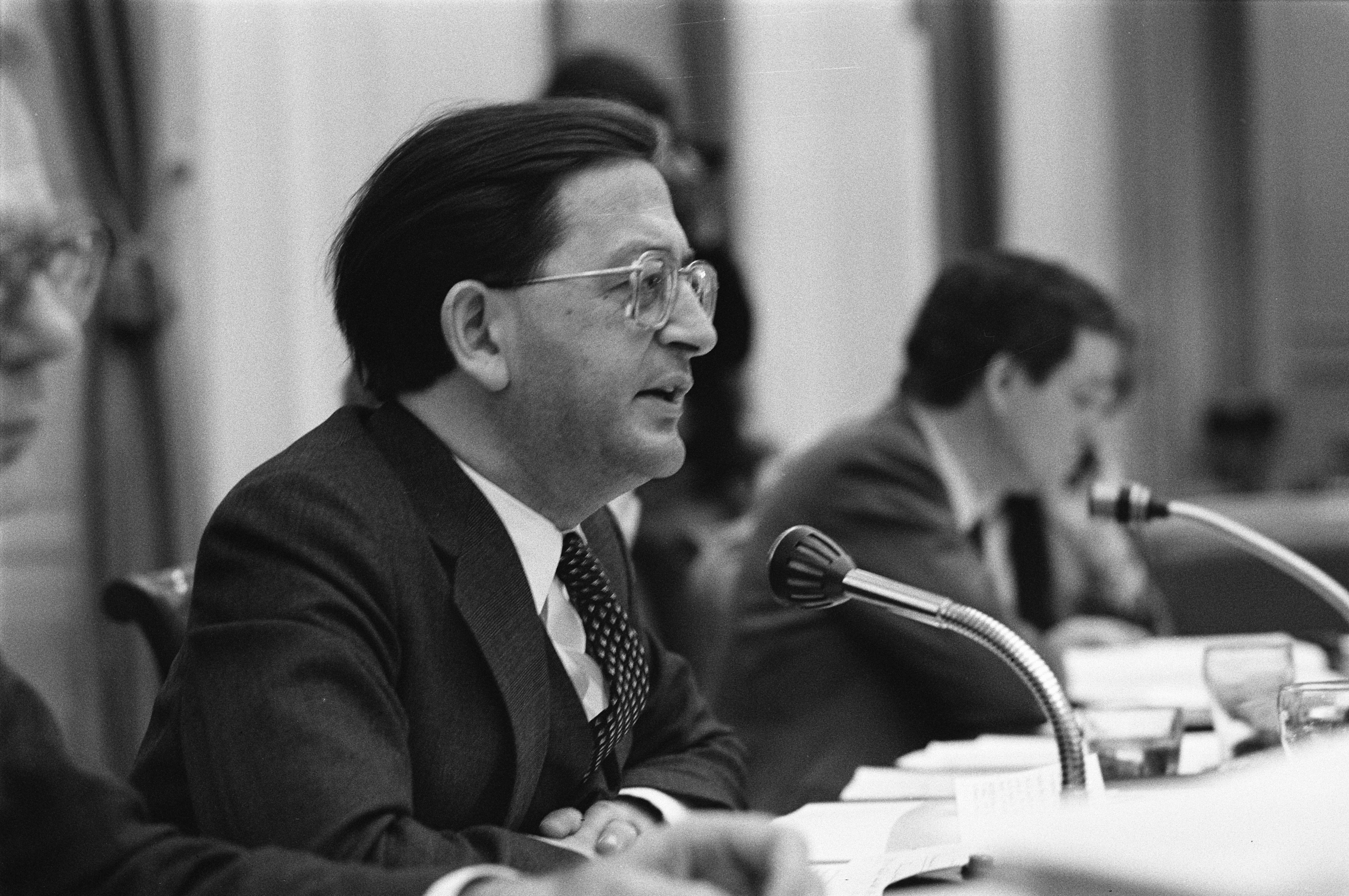 Collectie / Archief : Fotocollectie Anefo Reportage / Serie : [ onbekend ] Beschrijving : Commissie-vergadering O&W over wetsontwerp 2-fasenstructuur Wetenschappelijk Onderwijs, Minister Pais tijdens commissie-vergadering Datum : 1 december 1980 Locatie : Den Haag, Zuid-Holland Trefwoorden : ministers Persoonsnaam : Pais, Arie Fotograaf : Antonisse, Marcel / Anefo Auteursrechthebbende : Nationaal Archief Materiaalsoort : Negatief (zwart/wit) Nummer archiefinventaris : bekijk toegang 2.24.01.05 Bestanddeelnummer : 931-1825